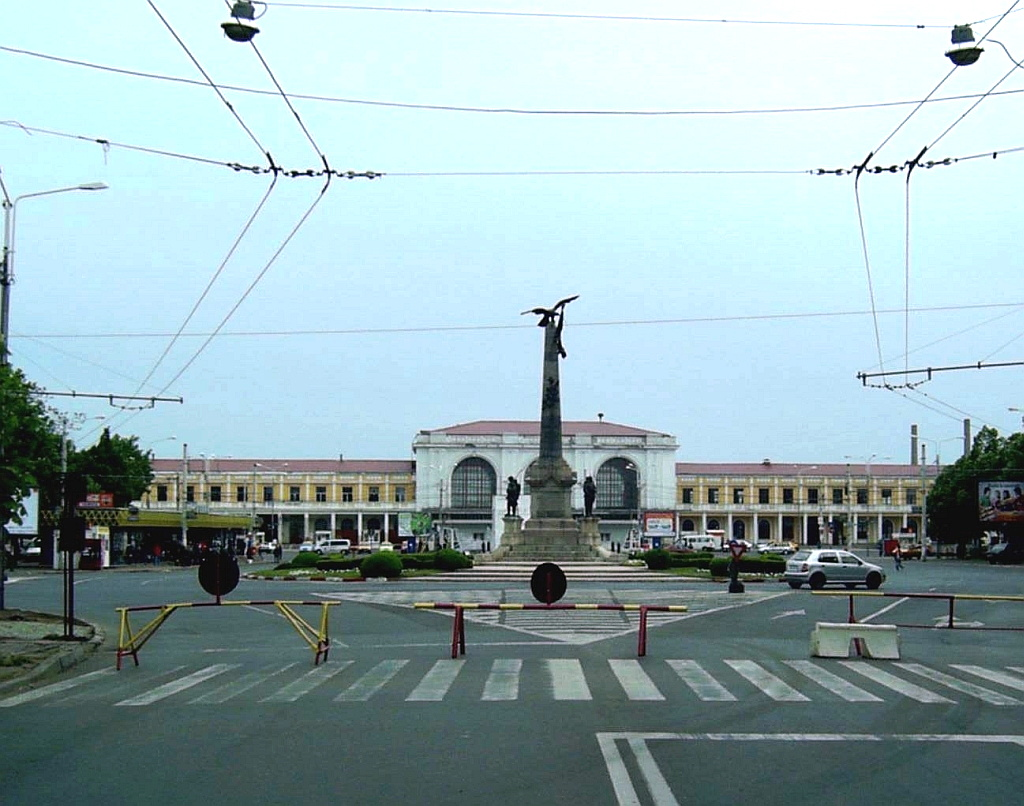 Bahnhof Sud, Ploiesti (Rumänien)